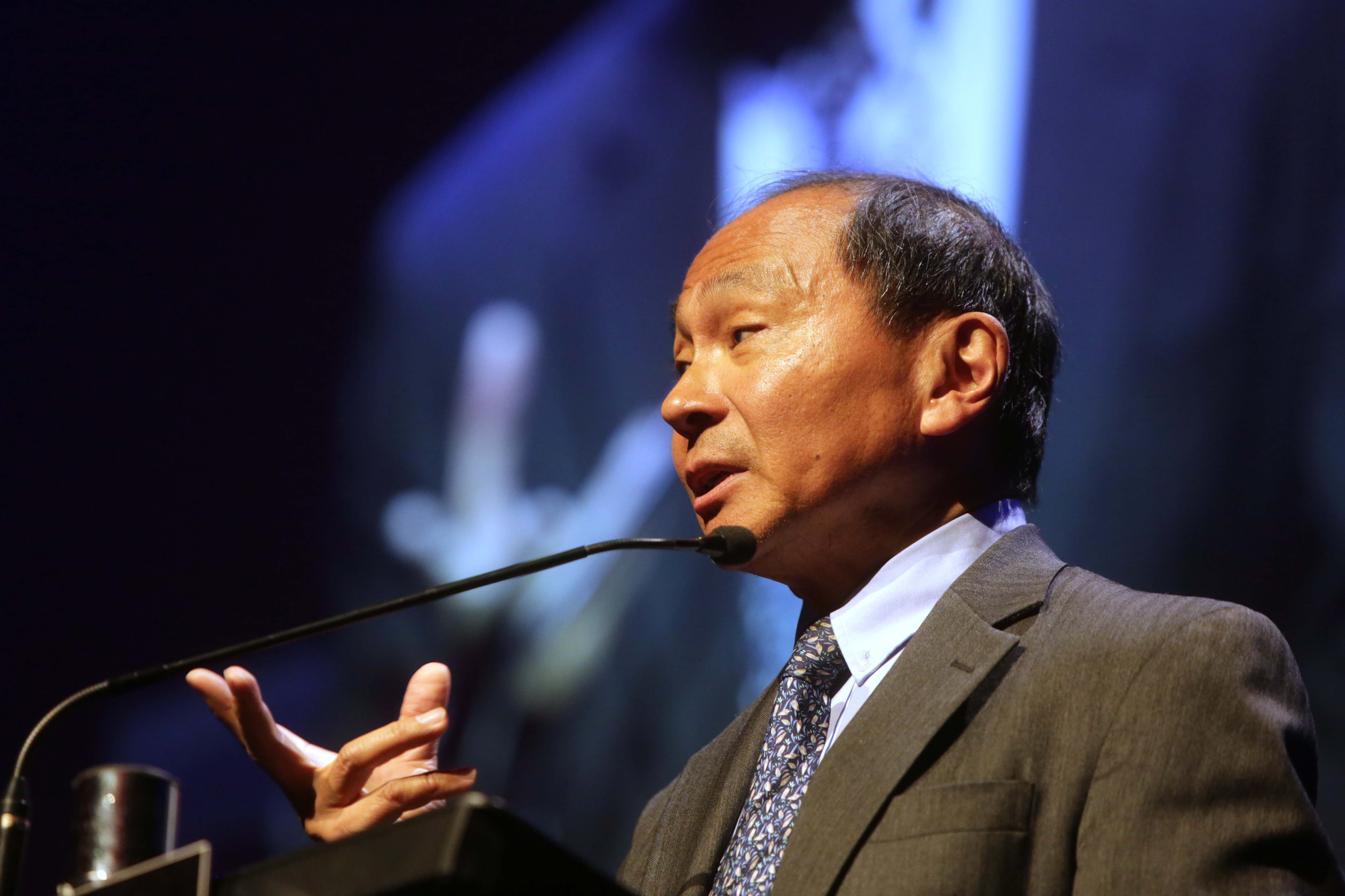 Francis Fukuyama no Fronteiras do Pensamento São Paulo